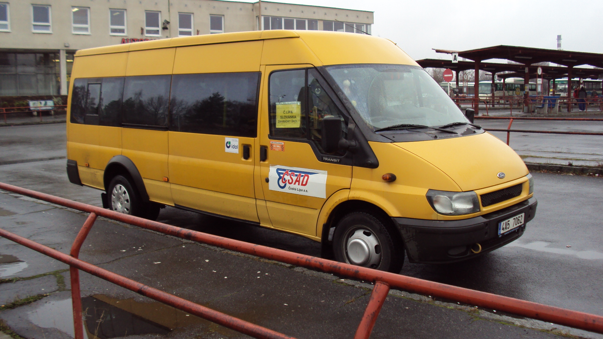 Mikrobus ČSAD Česká Lípa na bus nádraží Česká Lípa, meziměstská doprava